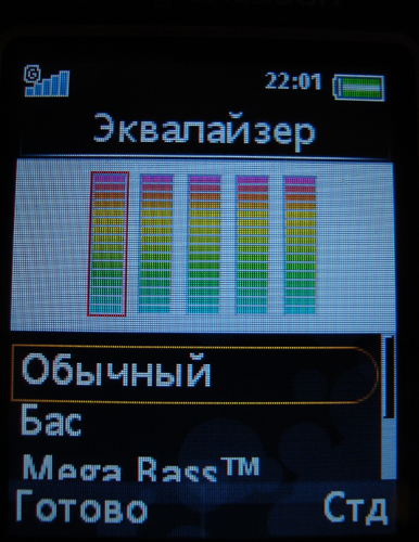 интерфейс эквалайзера (фото незадолго до загрузки), смотреть время на фото